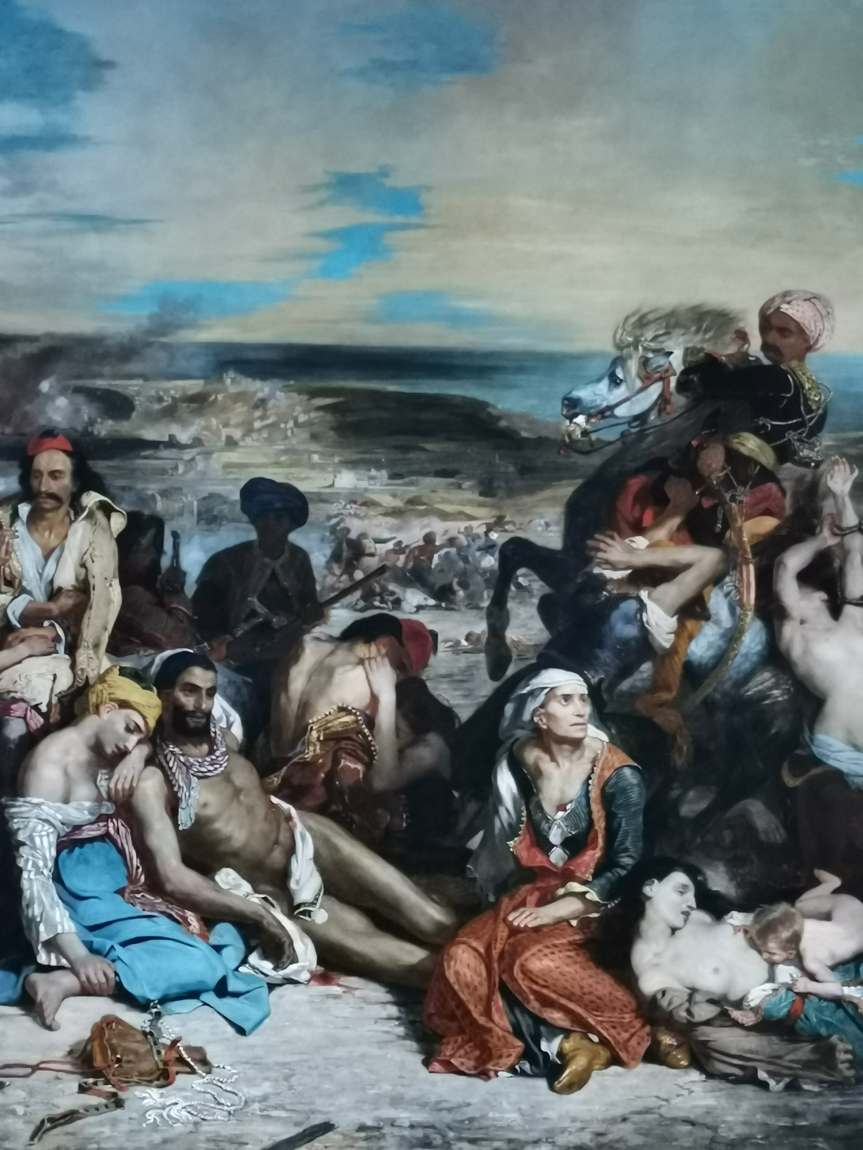 Delacroix - Massacre de Scio 1824 - Après restauration 2020 et retrait des vernis jaunis. Louvre